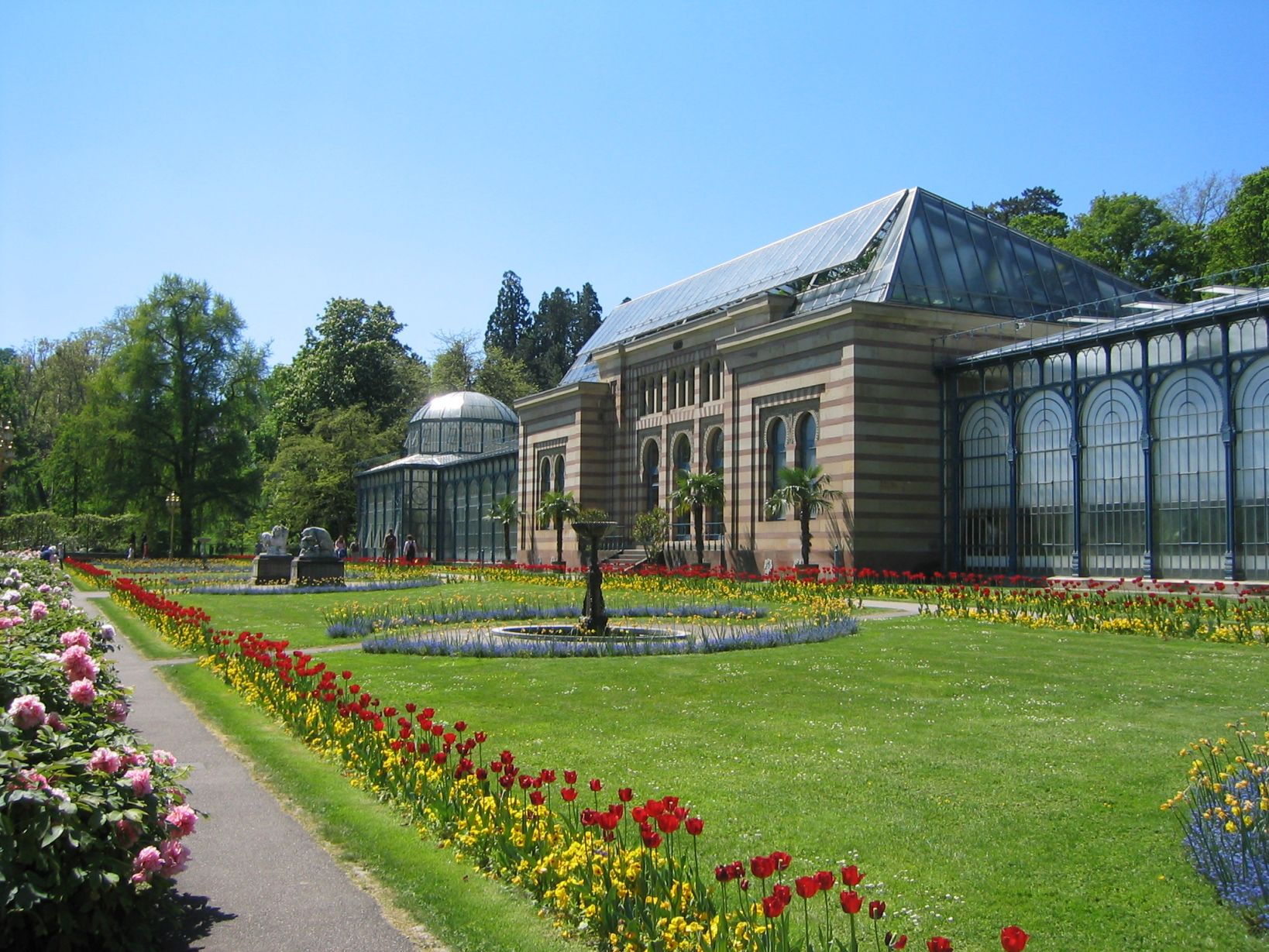 Maurisches Landhaus in der Wilhelma